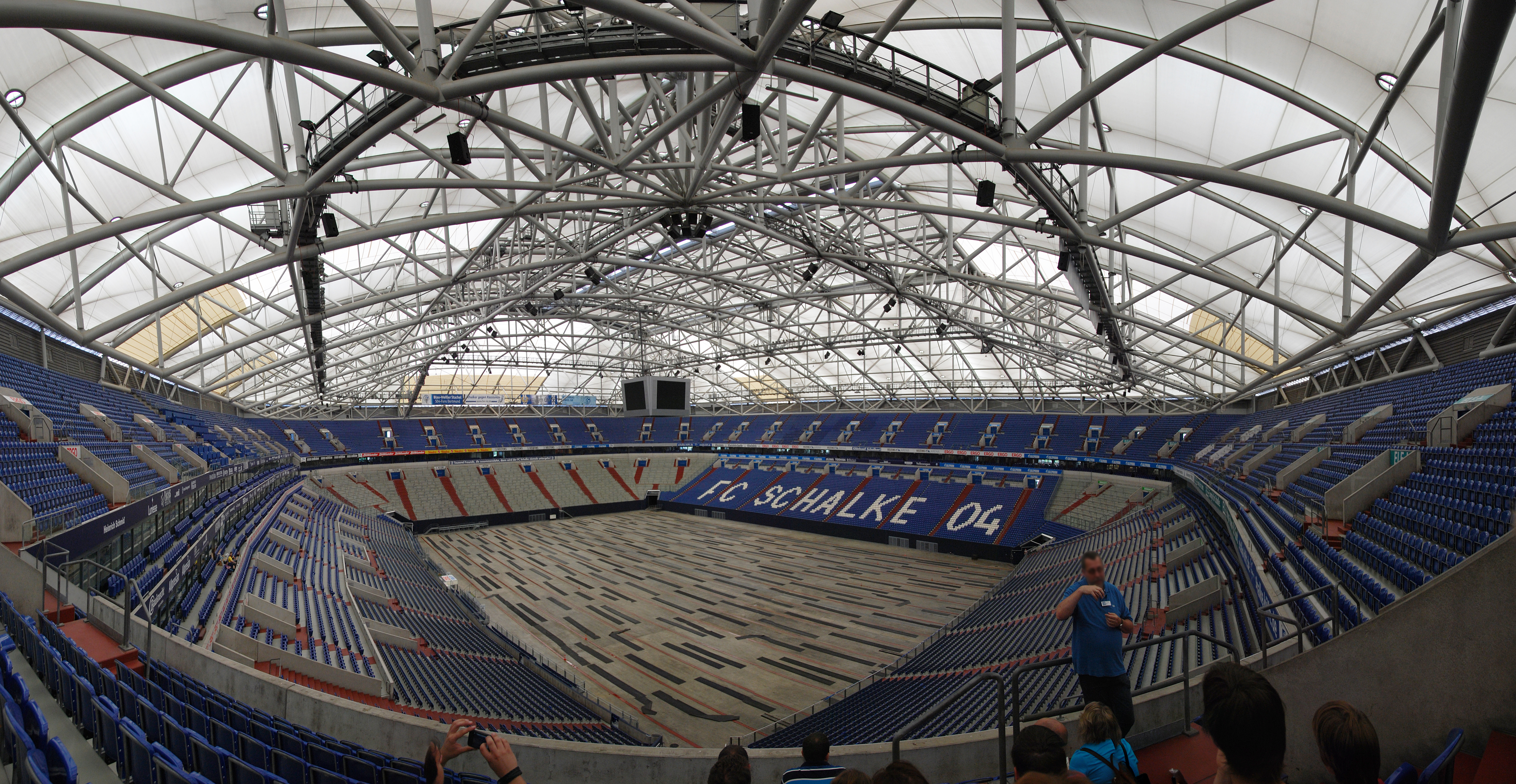 Panorama des Innenraums der Veltins-Arena, aufgenommen am 3. August 2011.